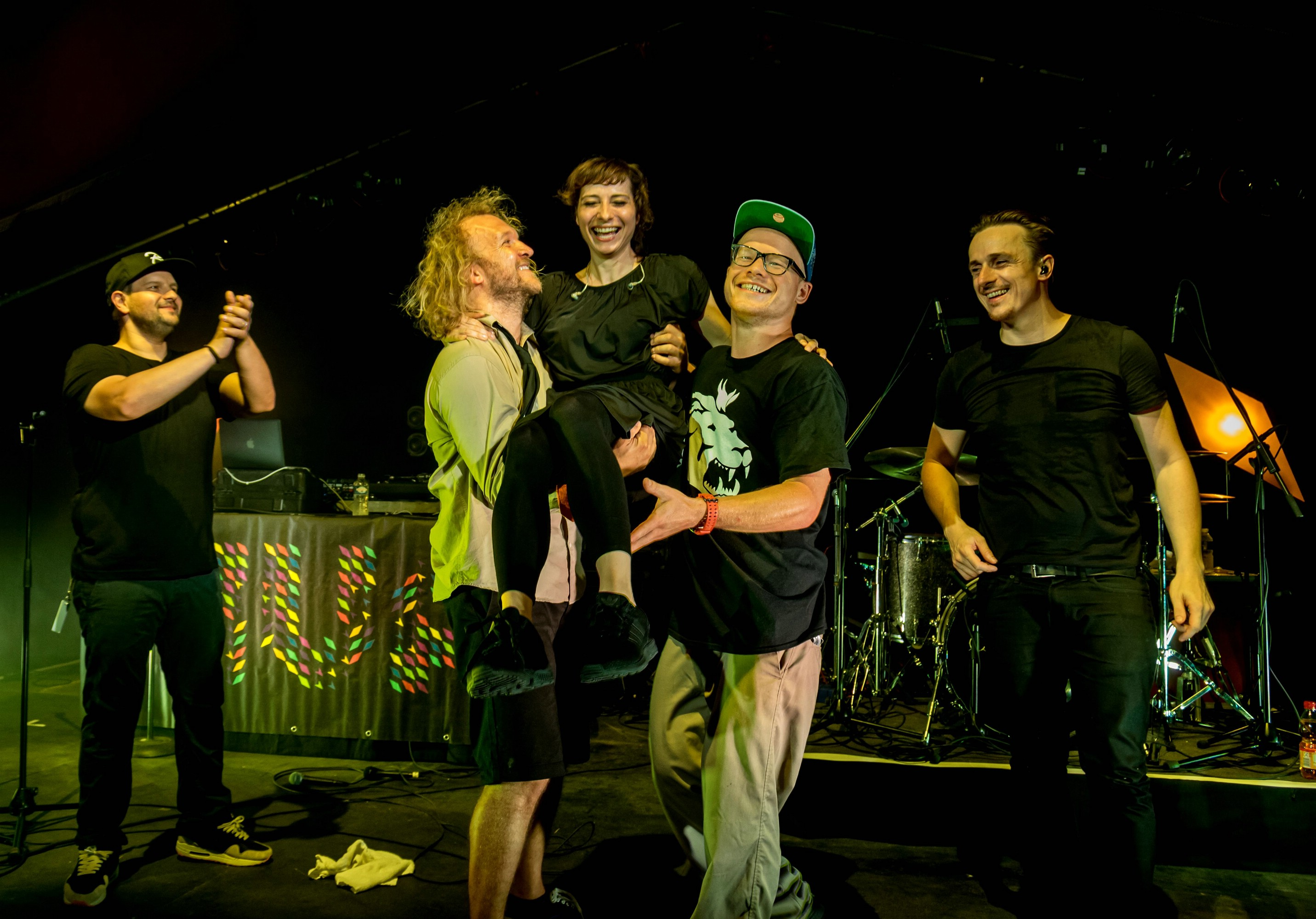 Das Zelt Musik Festival 2014 in Freiburg im Breisgau (16.07.2014 - 03. 08.2014) Die Gruppe "Fiva" im Spiegelzelt